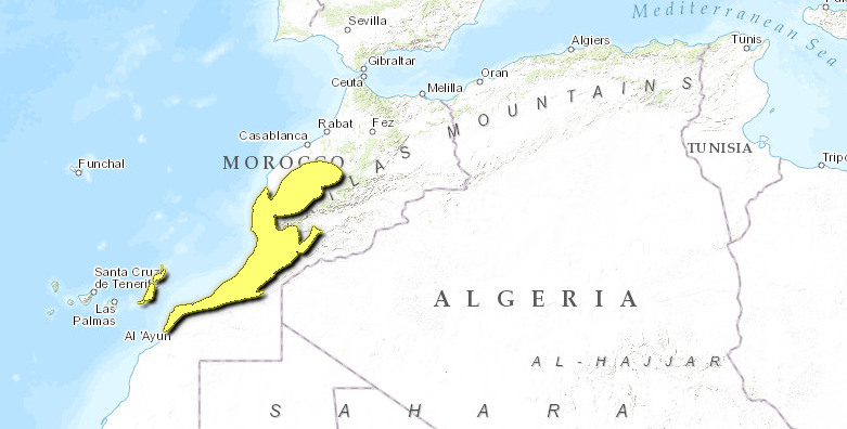 Mappa Ecoregione PA1212 - Boschi secchi mediterranei di Acacia-Argania e macchie di succulente